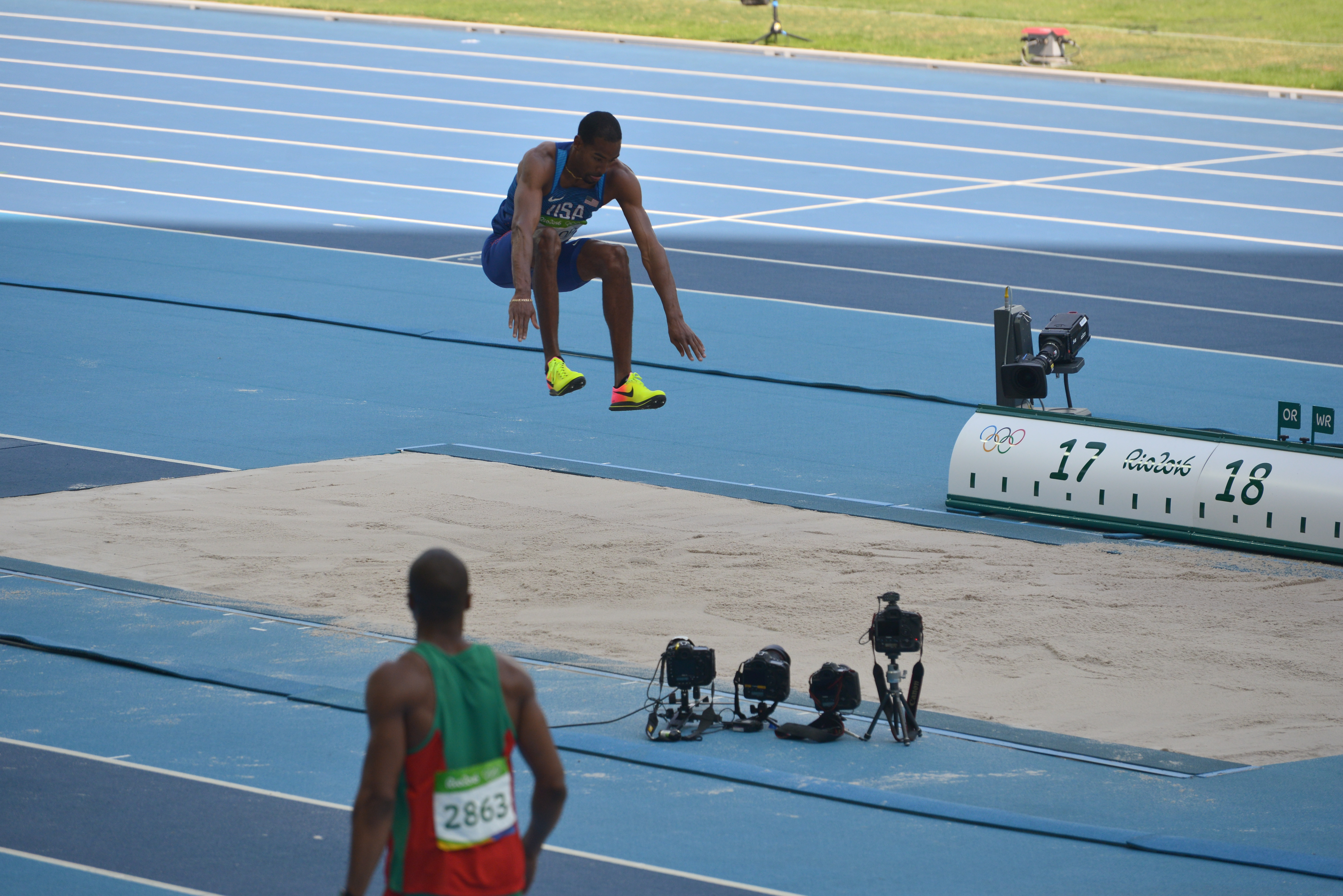 Christian Taylor lors du concours du triple saut au jo de Rio 2016